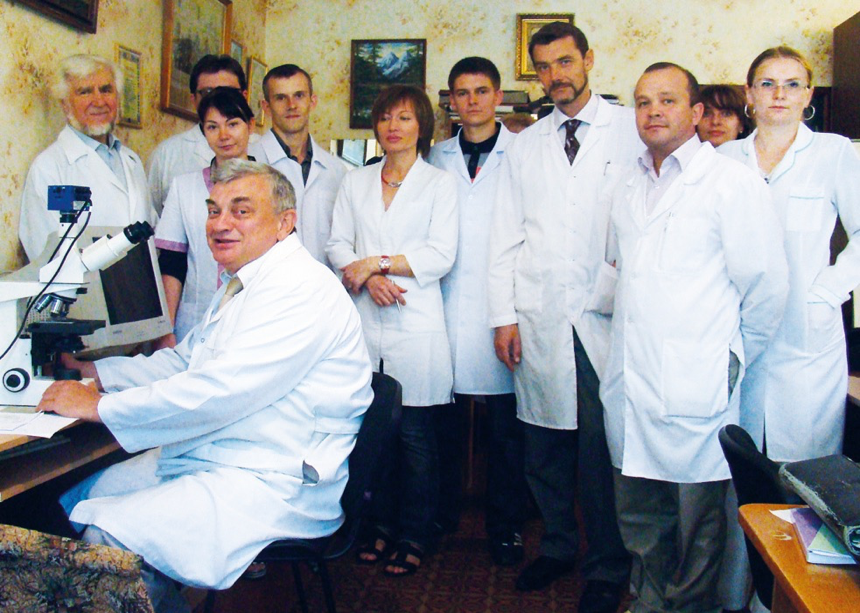 Проф. Волошин М.А. разом зі своєю командою великих анатомів